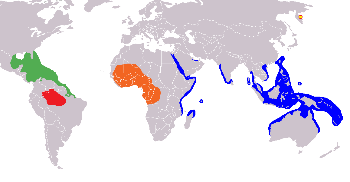 Worldwide distribution including Steller sea cow